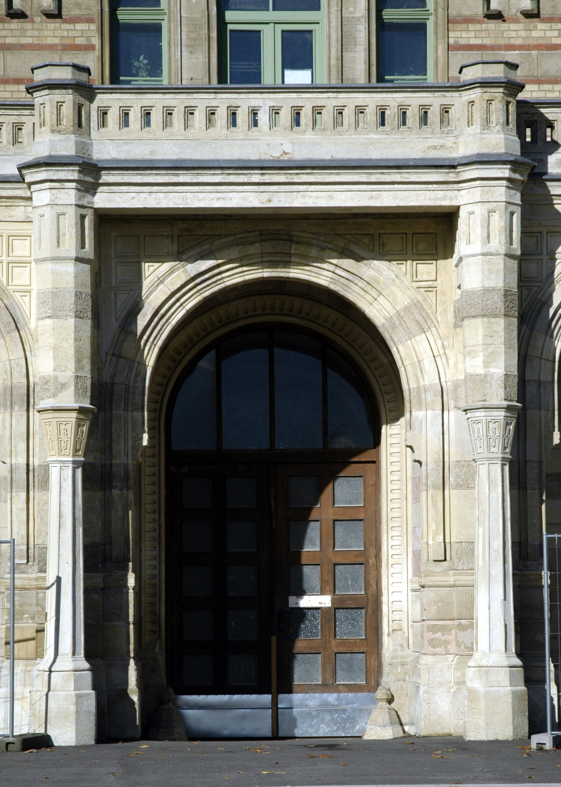 Martin-Kaserne, Hauptgebäude der Kaserne, Objekt 4, Mittelteil Süd Portal